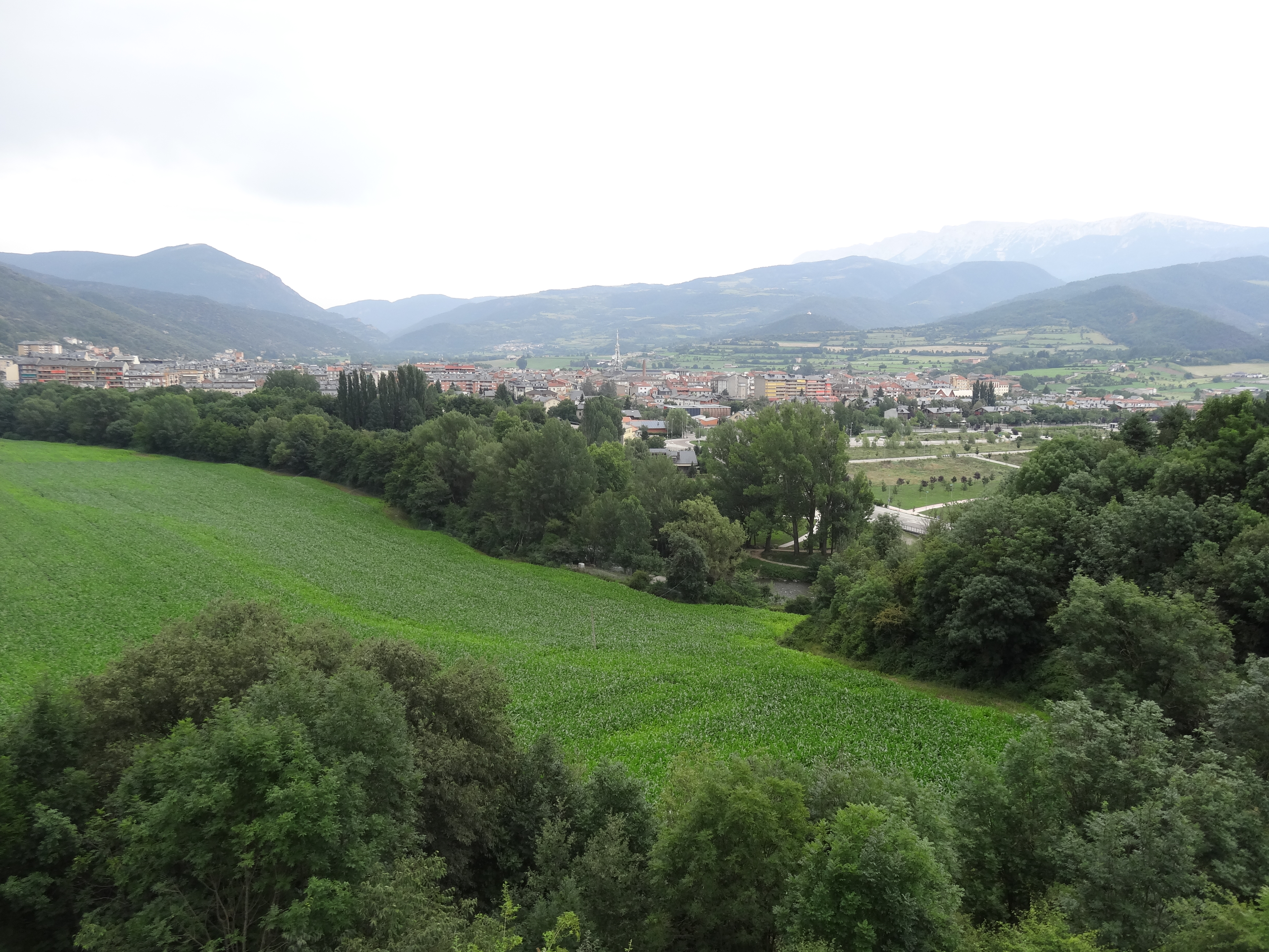 La Seu d'Urgell vista des de l'hotel El Castell de Ciutat.